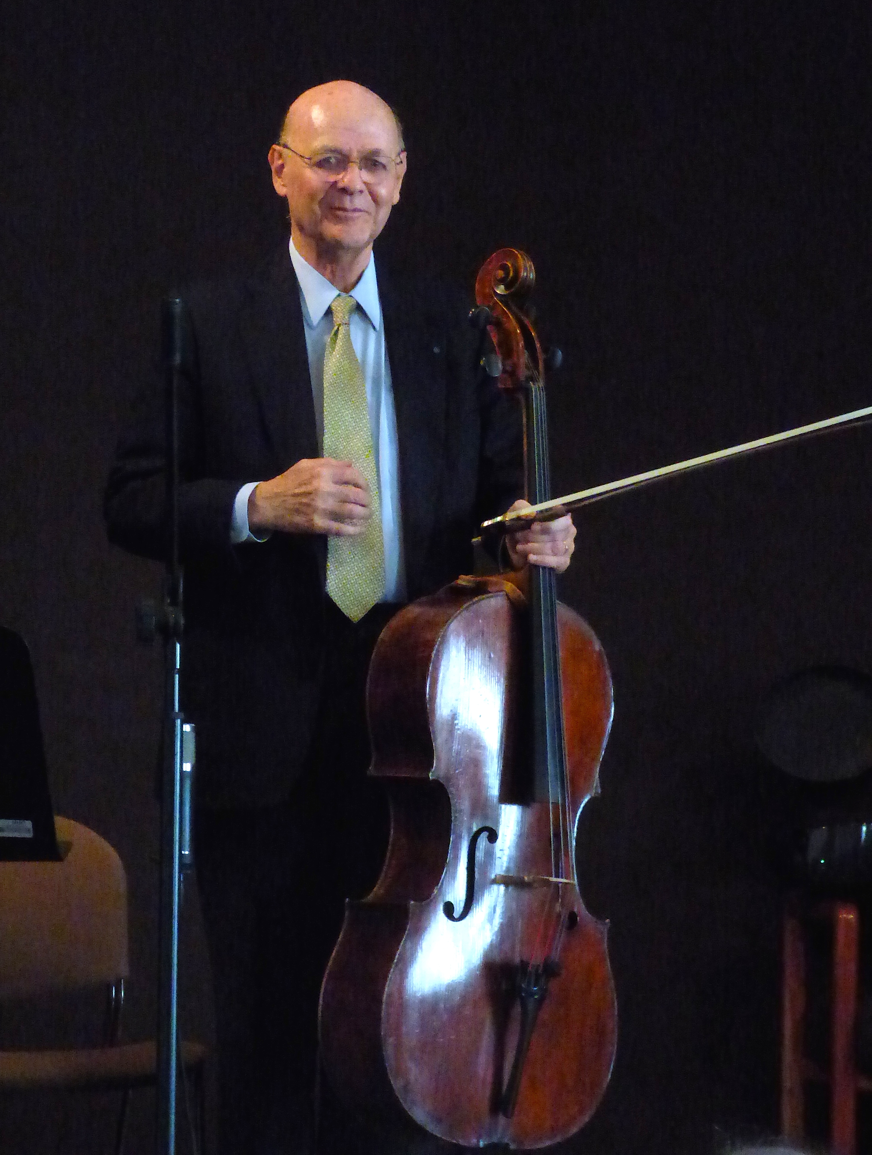 El cellista Carlos Prieto, durante la presentación de su libro Apuntes sobre la Historia de la Música en México, en el Centro Cultural Universitario de la Universidad Autónoma de Aguascalientes